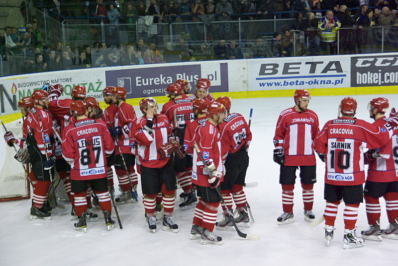 Drużyna ComArch Cracovii po piątym meczu finałowym o Mistrzostwo Polski 2011/2012 z Ciarko PBS Bank Sanok (Arena Sanok, 14 marca 2012)